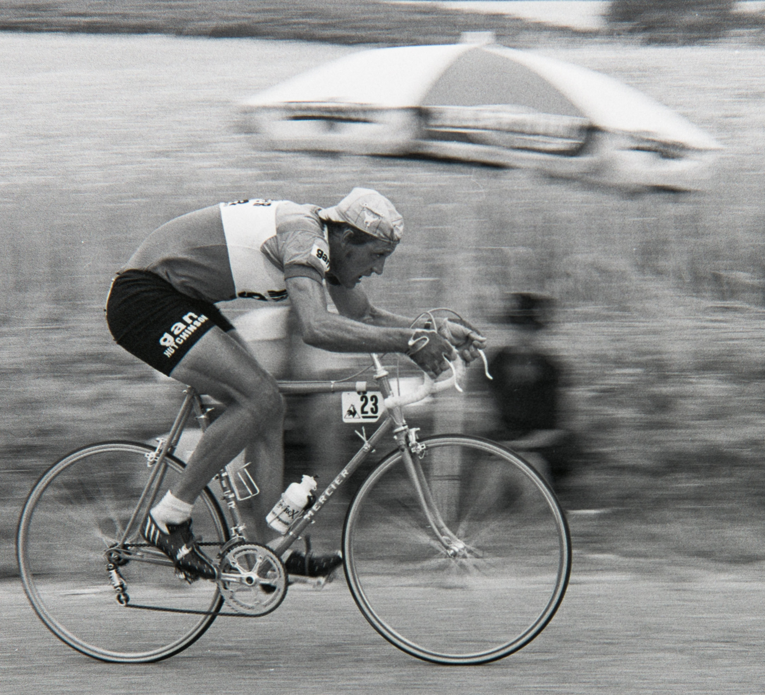 Jean-Pierre Genet durant le Tour de France 1976. Photographie : René Milanese